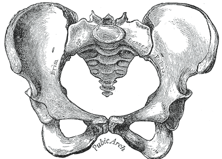 Female pelvis